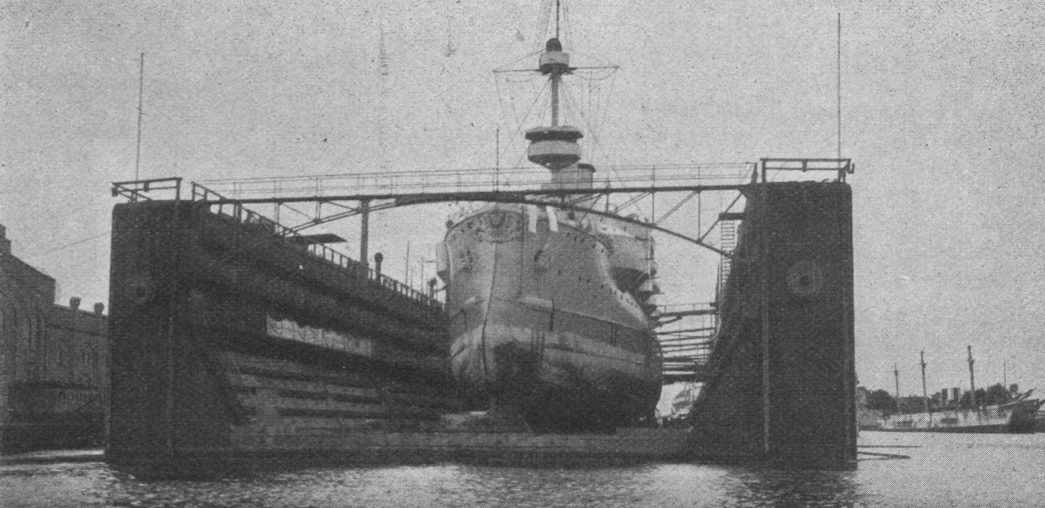 Das deutsche Küstenpanzerschiff SMS Siegfried im Schwimmdock der Kaiserlichen Werft Danzig.